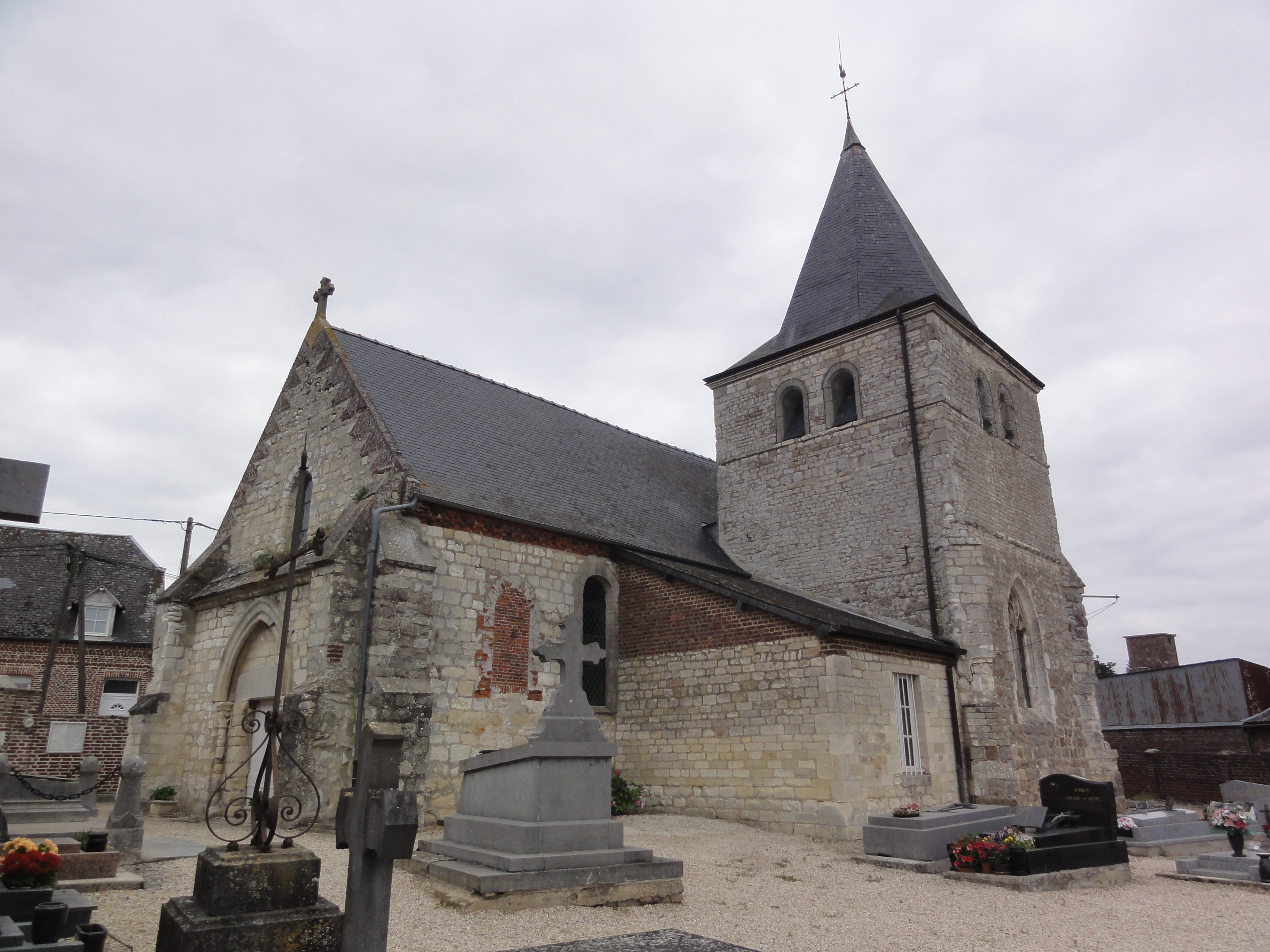 Toulis-et-Attencourt (Aisne) église